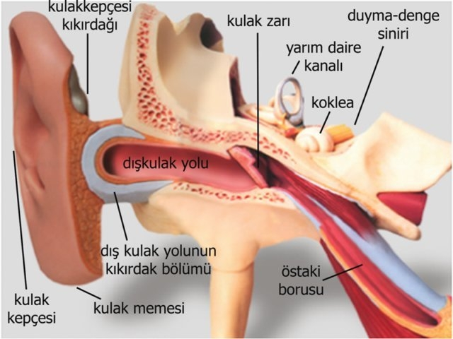 ".jpg"